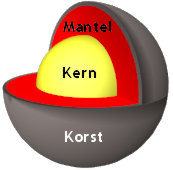 Binnenkant van Venus